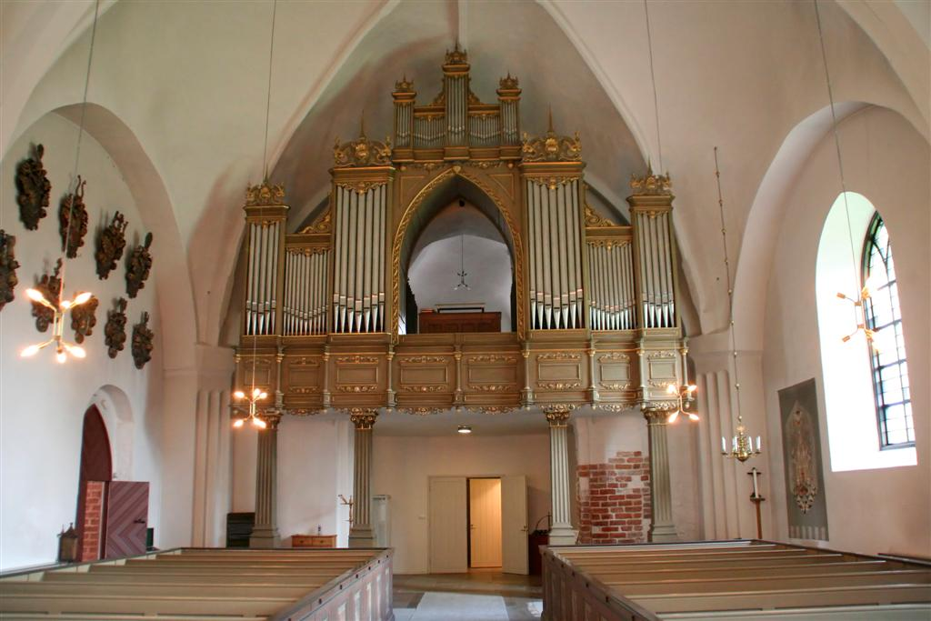 Foto: Tor Svensson